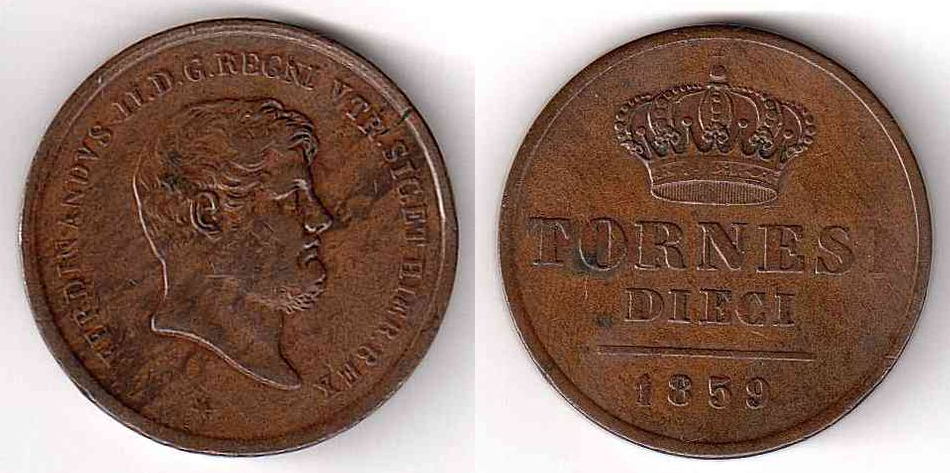 10 tornesi, 1859, Regno delle Due Sicilie